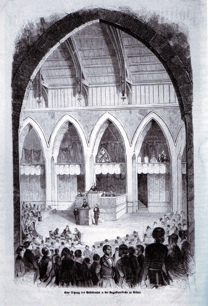 Sitzung des Volkshauses des Erfurter Unionsparlaments im Jahr 1850 im Schiff der Augustinerkirchen